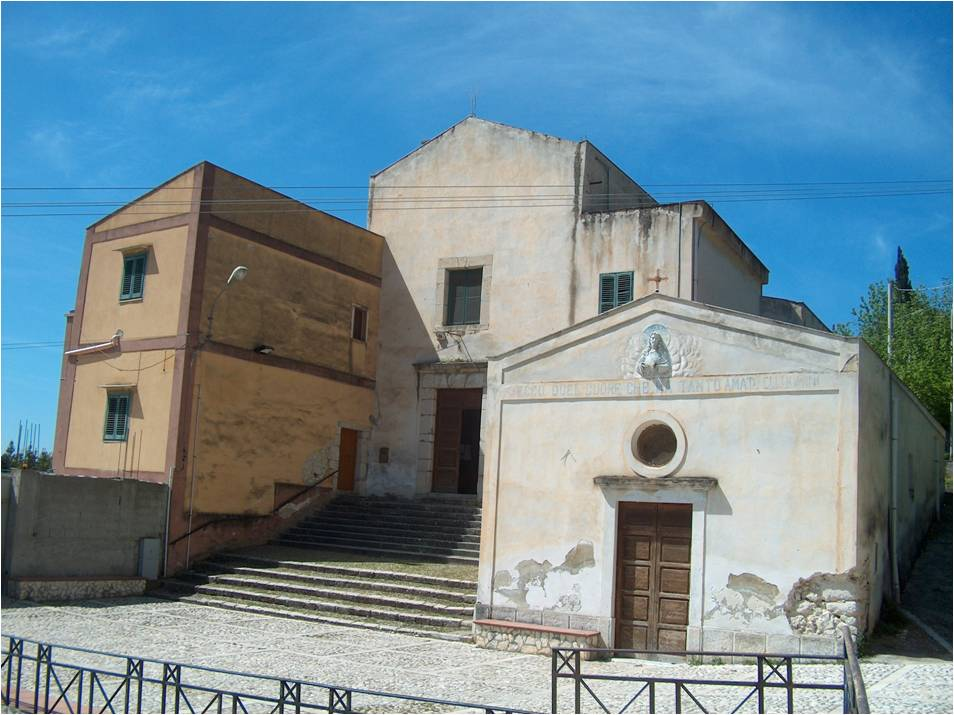 Convento Cappuccini